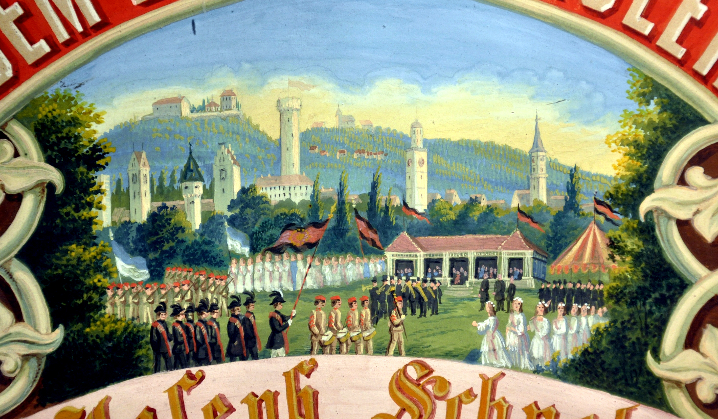 Rutentafel „Dem besten Schüler“ für Joseph Schnetz, Rutenfest 1873, Ravensburg; signiert „Bayer“; Privatbesitz, Detail: Festgeschehen auf der Kuppelnau